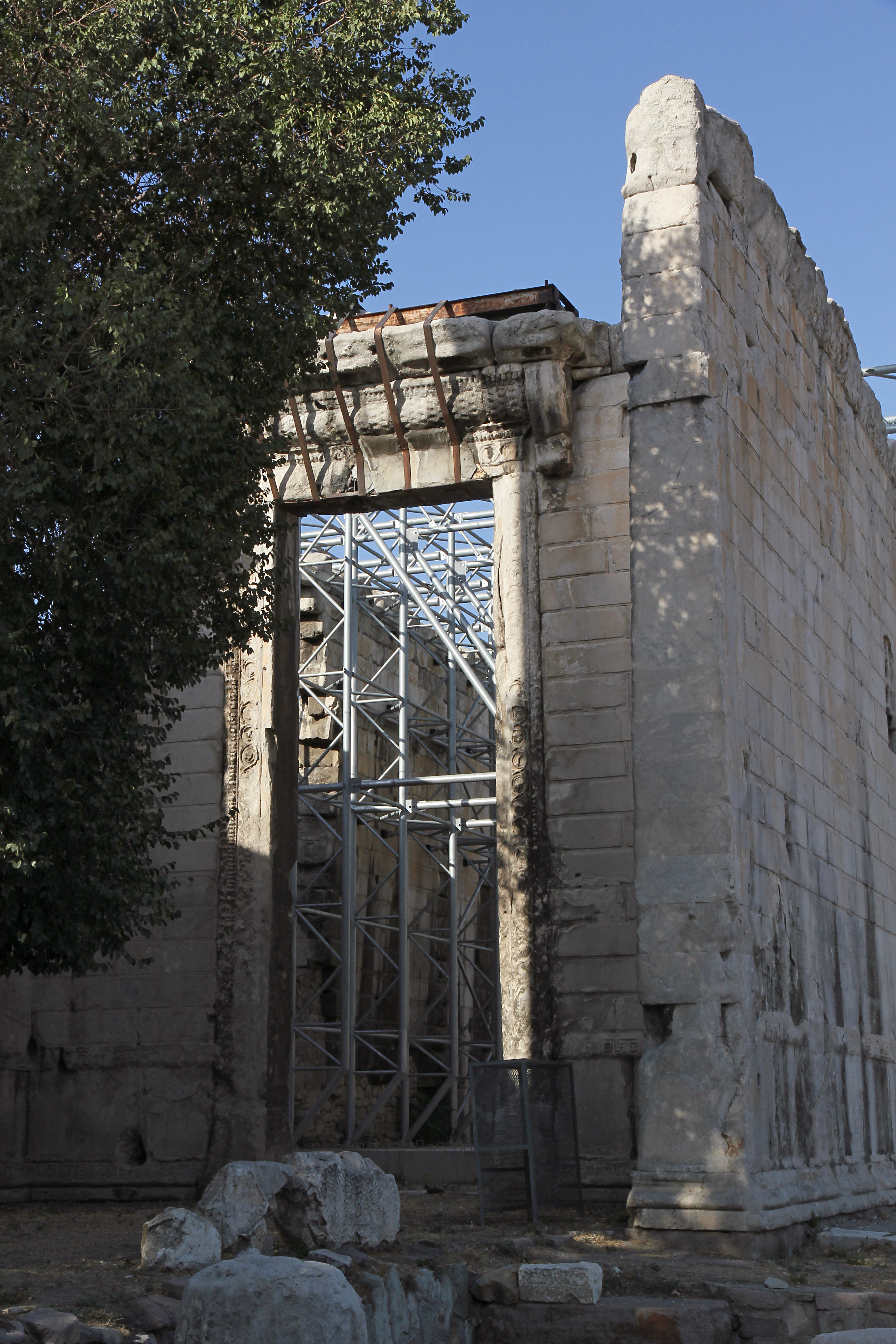 Tempel der Roma und des Augustus, Ankara, Türkei, von Süden